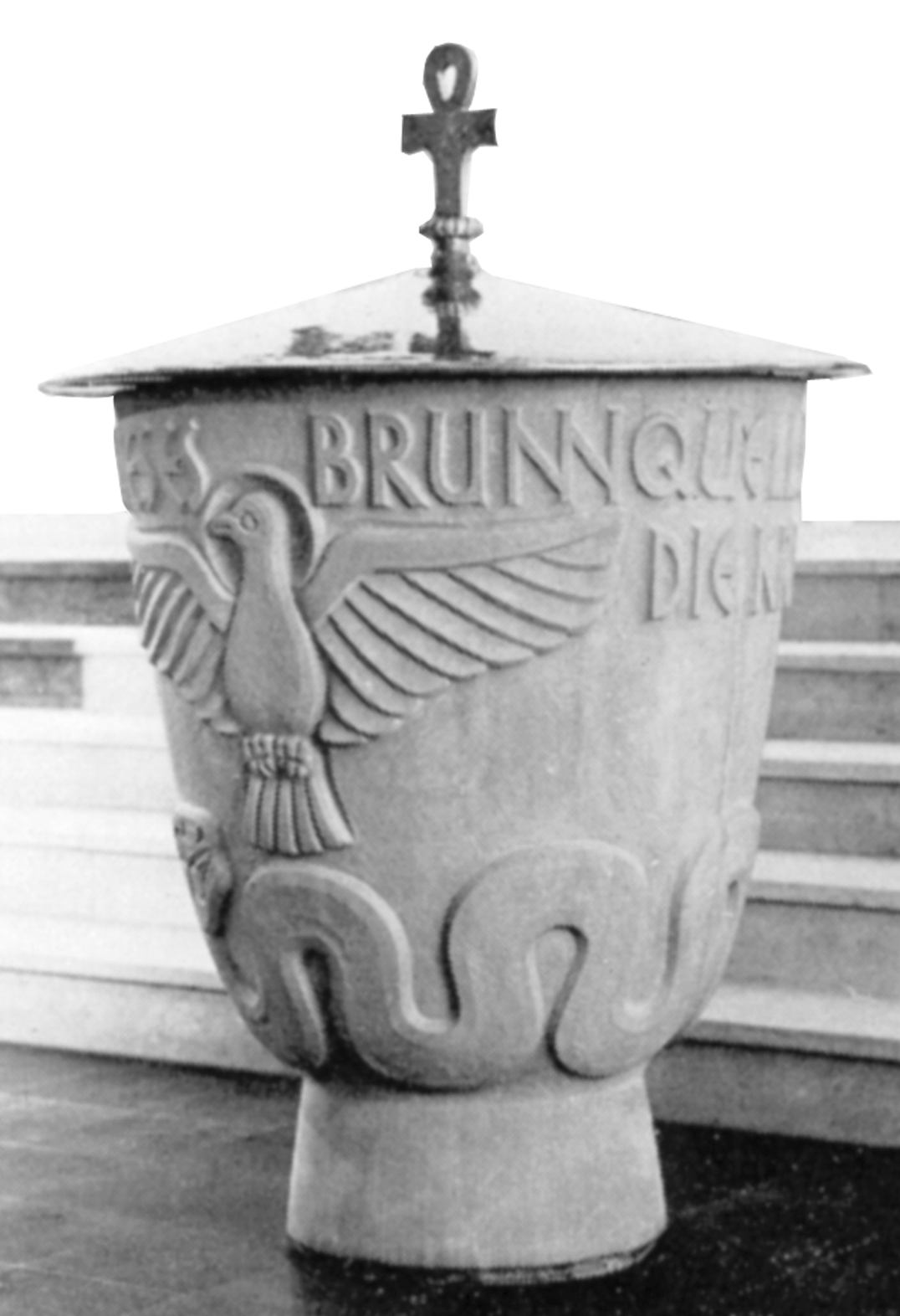 Taufbecken erstellt in Maria Laach